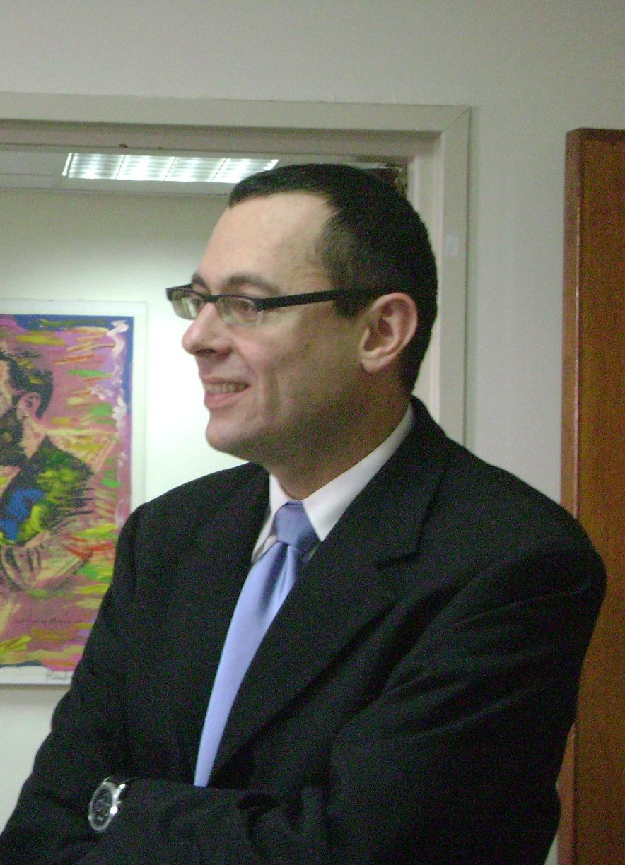 צבי האוזר